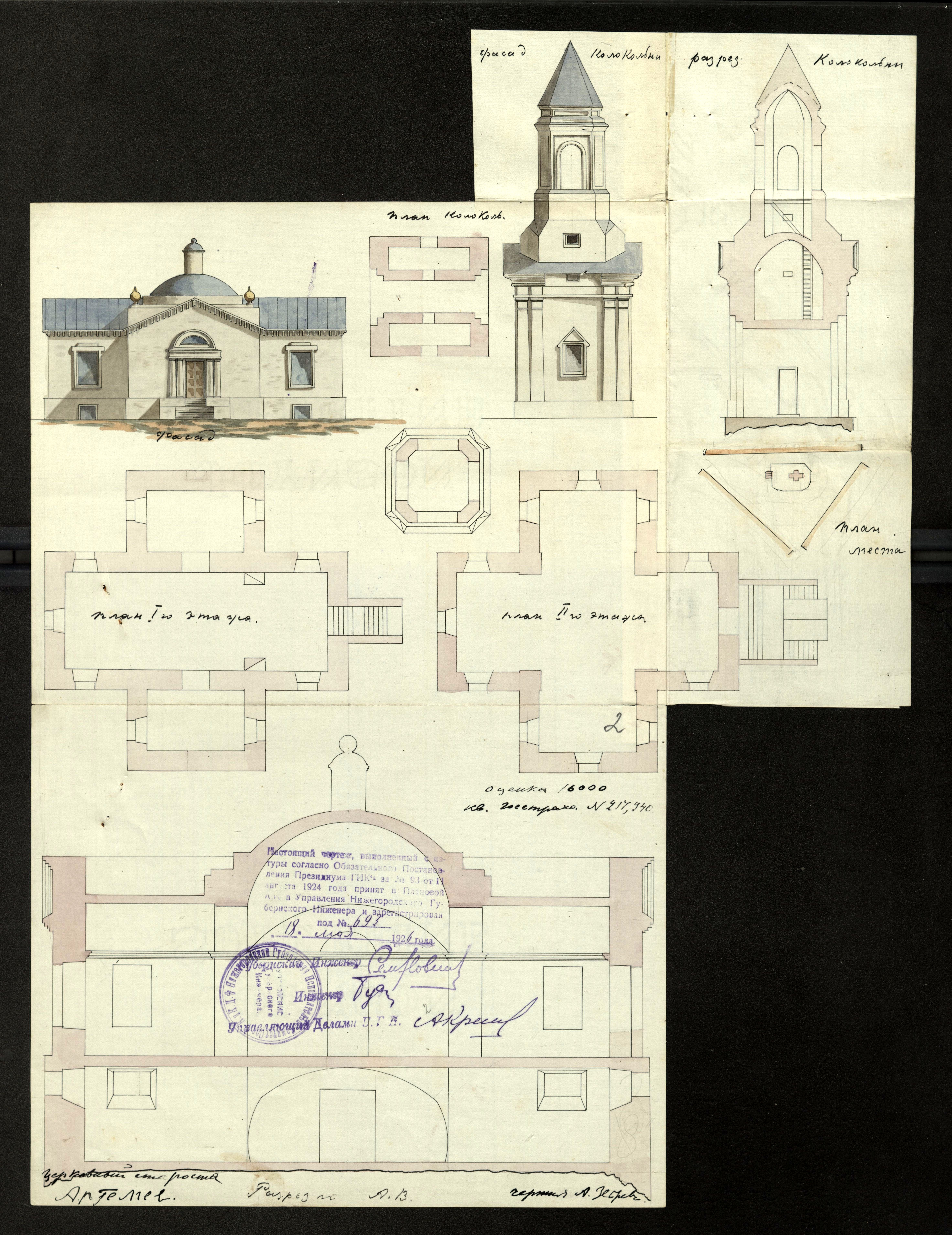 Чертежи выполнены с натуры в 1926 году, хранятся в ГАНО